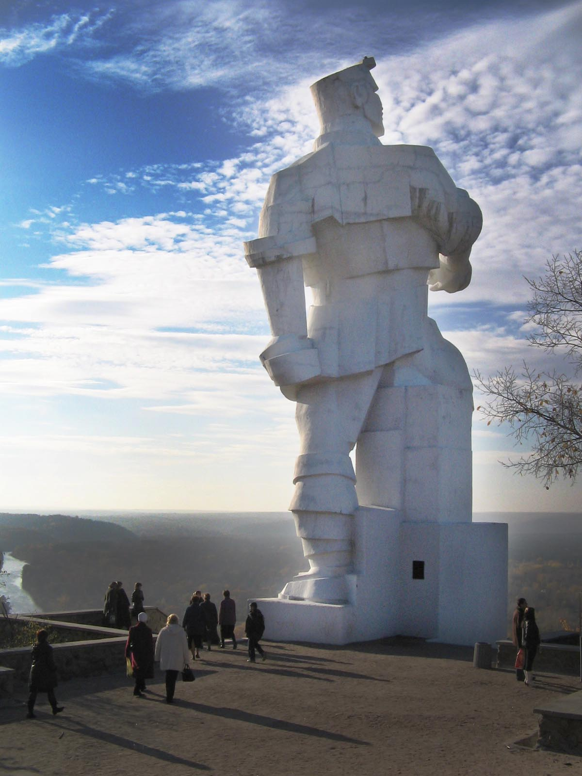 Донецька область м. Святогірськ